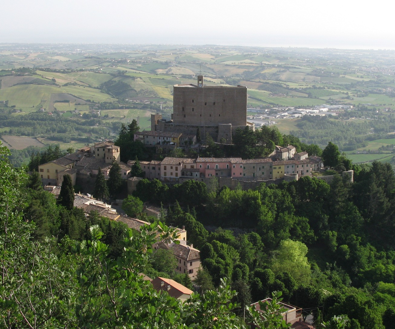 Veduta del borgo di Montefiore Conca.